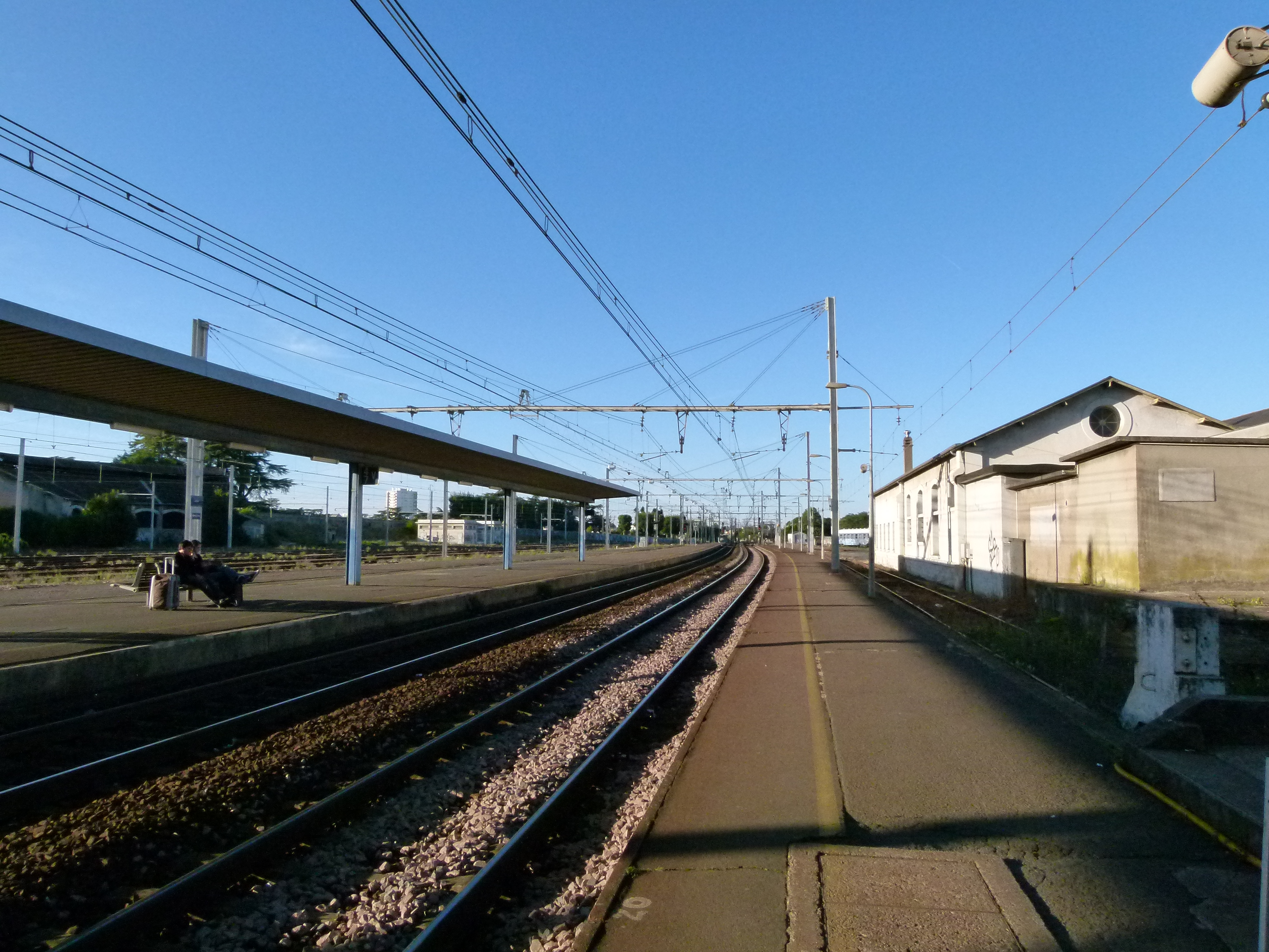 Gare de Blois - Les quais